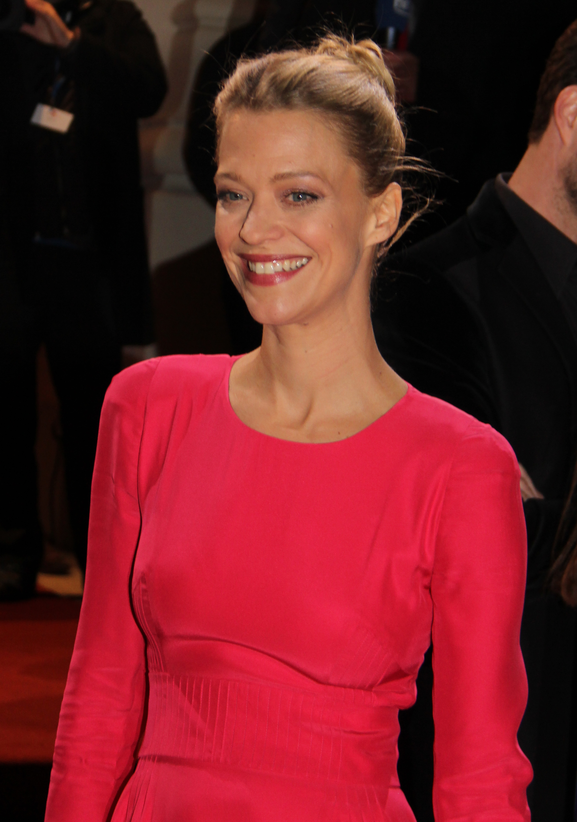 Heike Makatsch beim Hessischen Film- und Kinopreis 2012